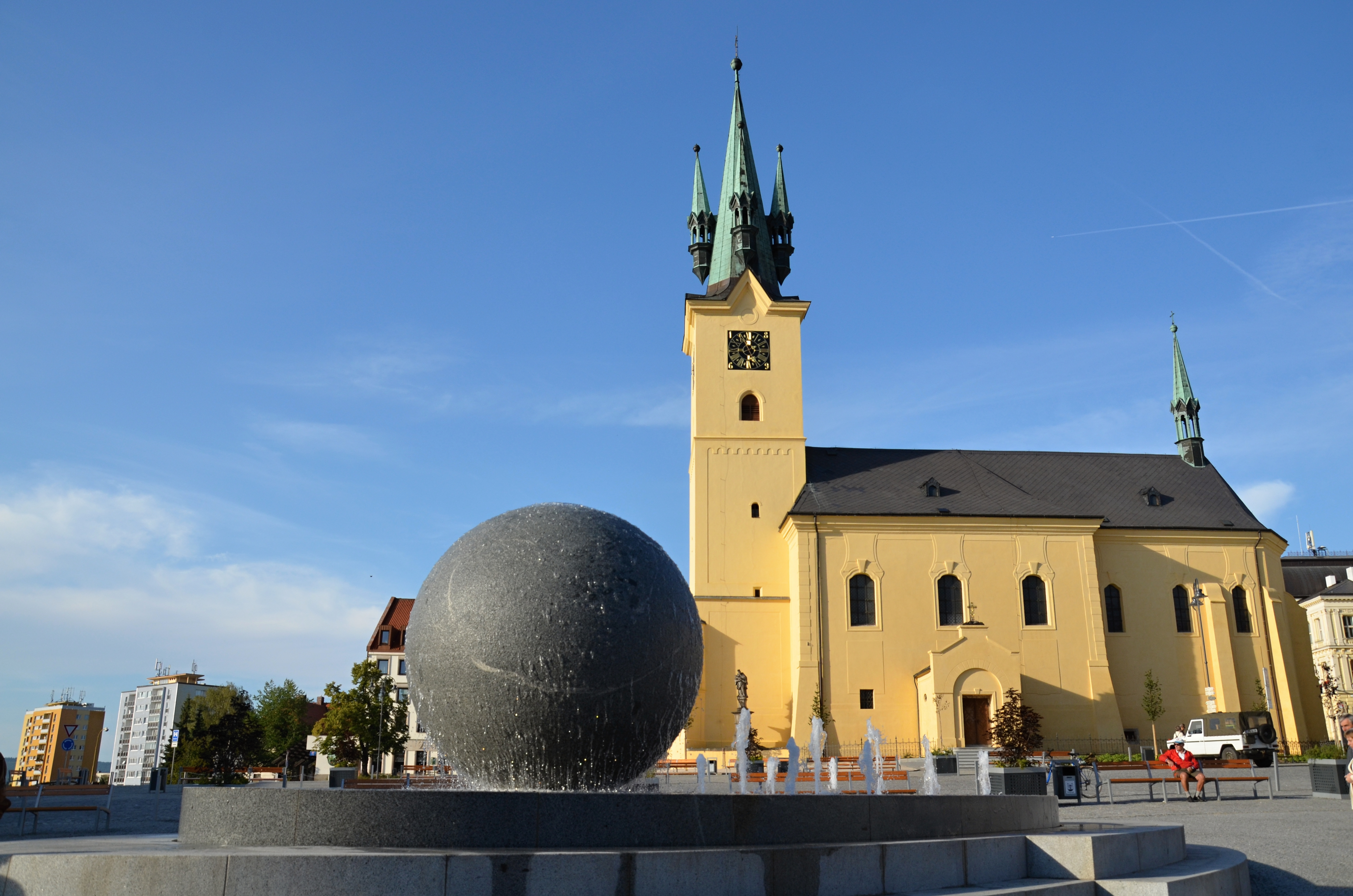 Zrekonstruované náměstí TGM s novou Moderní fontánou .Která nejen svítí , ale také hraje melodie , žulová koule má průměr 2,2 metry a je unikátní v celé České republice .